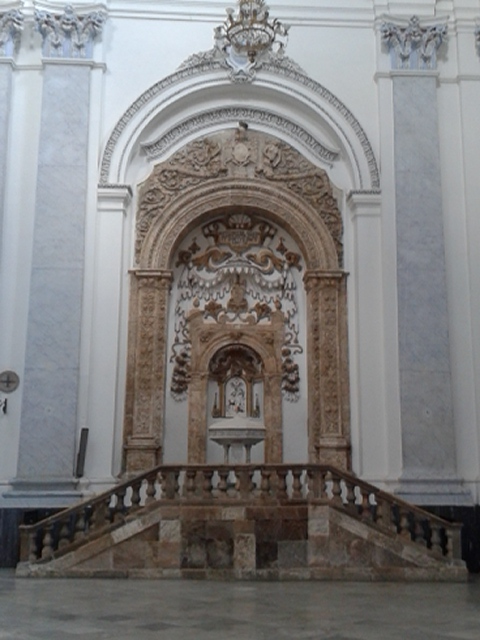 Il battistero di Antonello Gagini della Basilica Cattedrale di Piazza Armerina